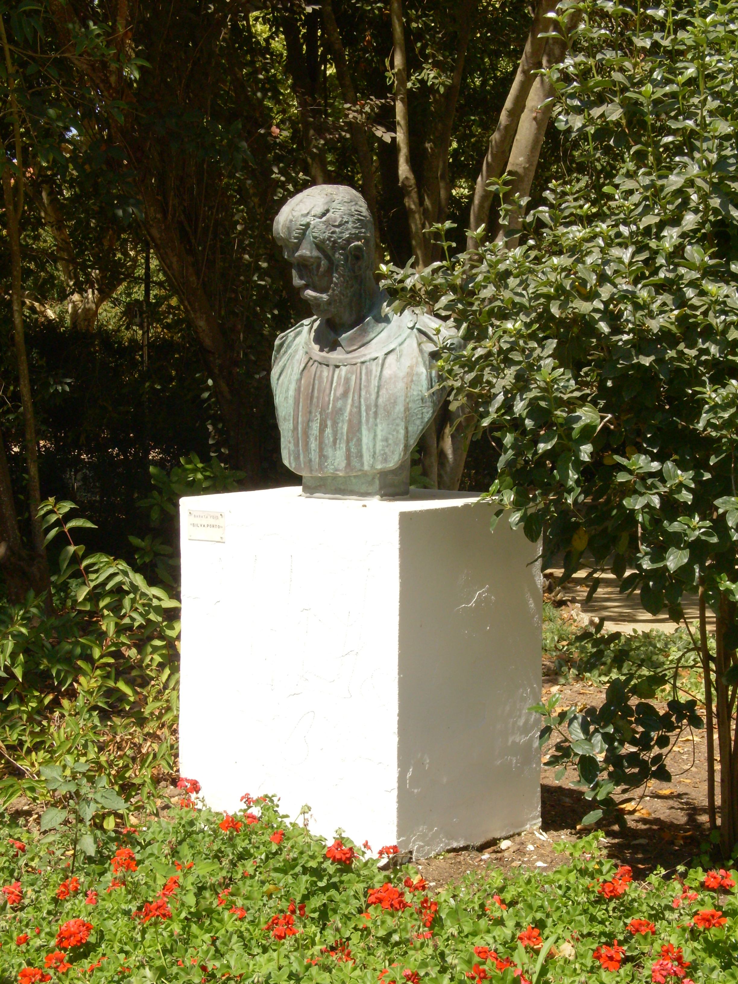 Busto em bronze de António da Silva Porto por Salvador Barata Feyo. Parque D. Carlos I, Caldas da Rainha, Distrito de Leiria, Portugal.